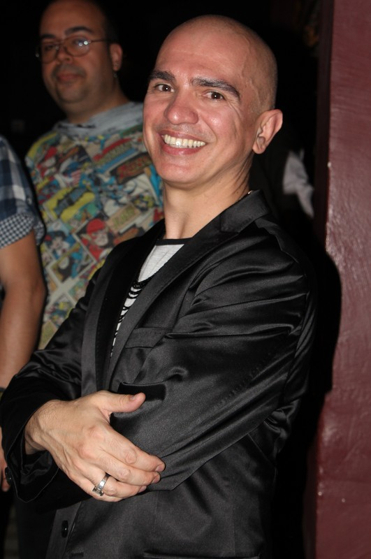 Edson Cordeiro-040